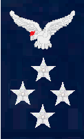 Pala General del Aire Chile